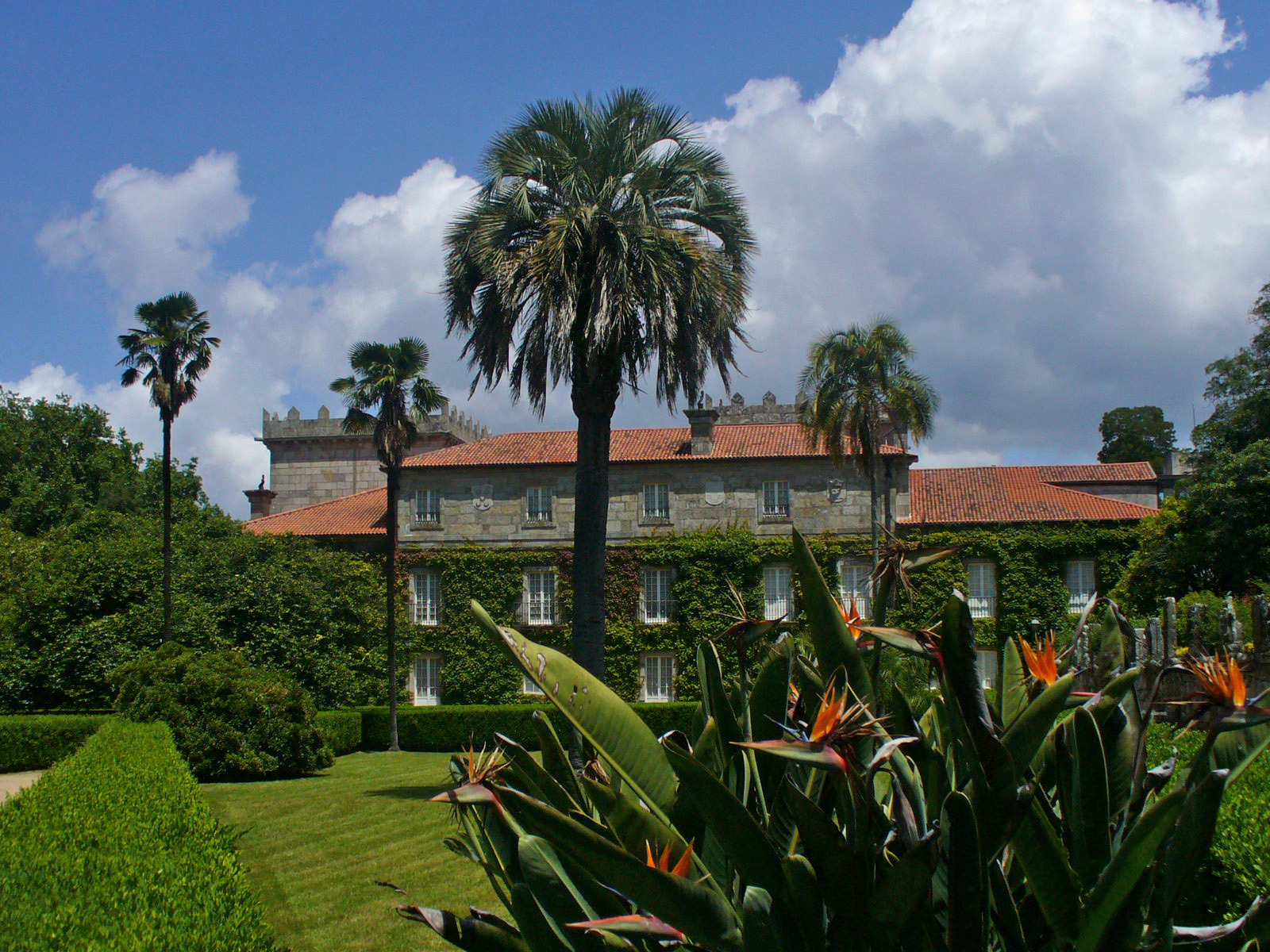 Perspektivo de la franca ghardeno. Palaco Quiñones de León, Vigo, Galegio